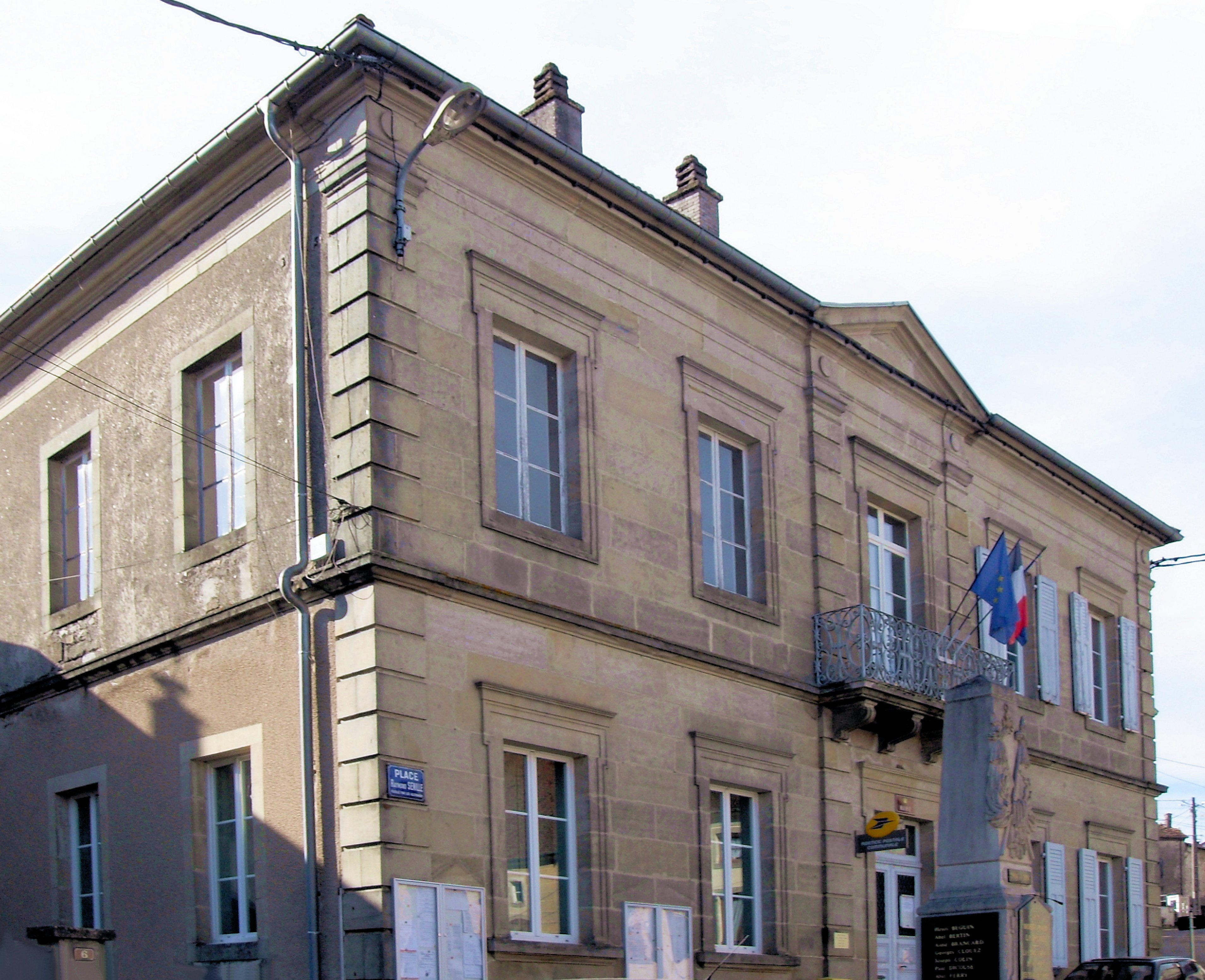 La mairie de Isches